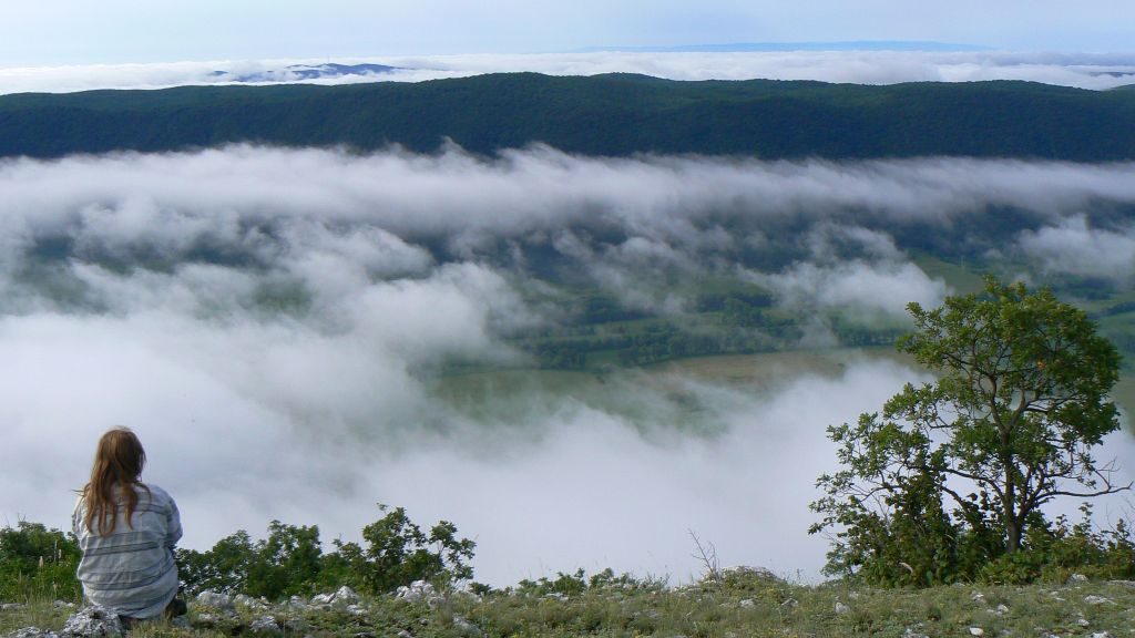 Inverzia nad Turnianskou kotlinou. Pohľad z planiny Horný vrch do centrálnej časti kotliny. V pozadí masív najvyššieho vrchu planiny Dolný vrch (Pavlovský vrch, 611 m n. m.). Výškový rozdiel medzi dnom kotliny a morfologickou hranou Horného vrchu je v týchto miestach asi 500 m.